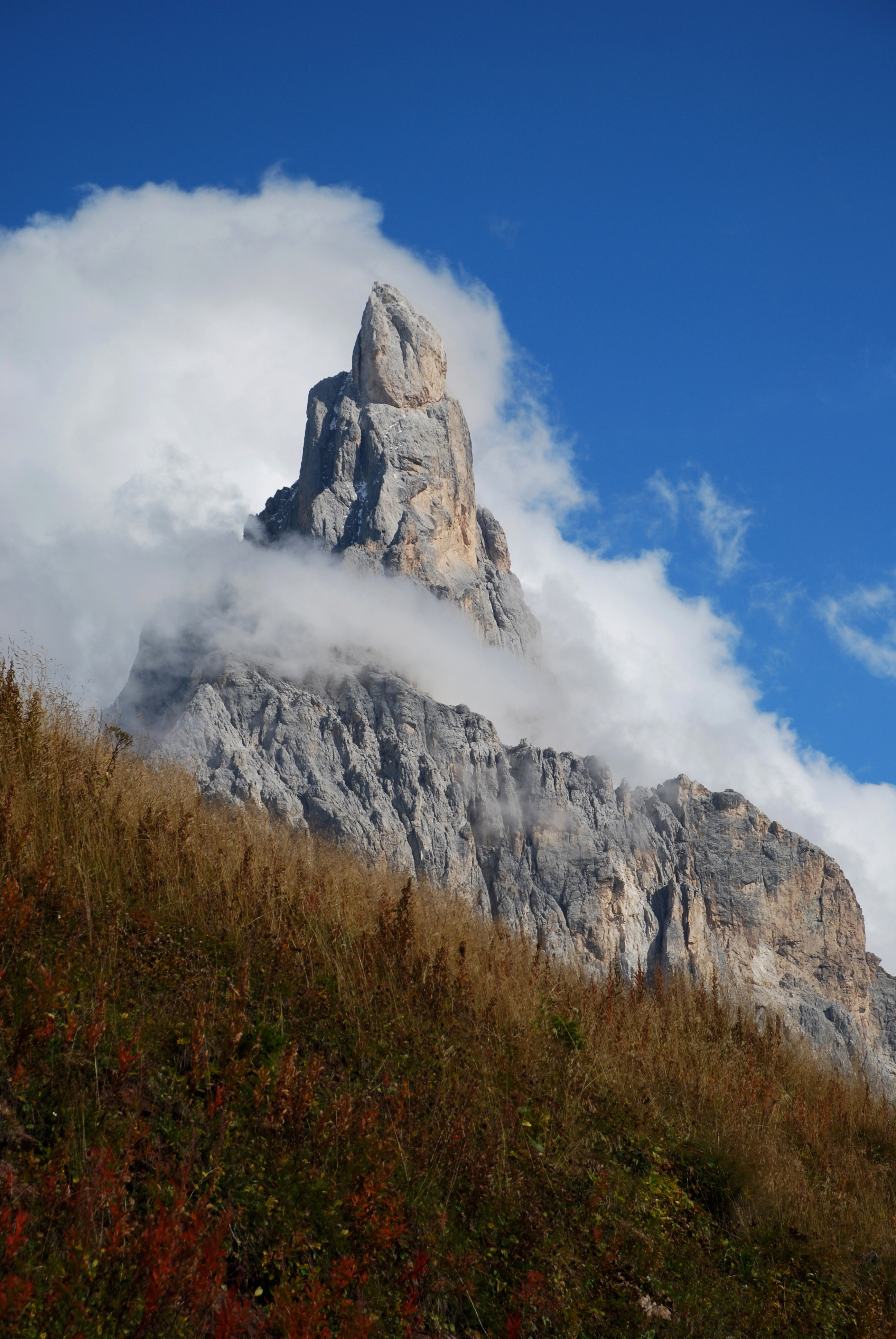 Il Cimon della Pala nel gruppo delle Pale di san martino